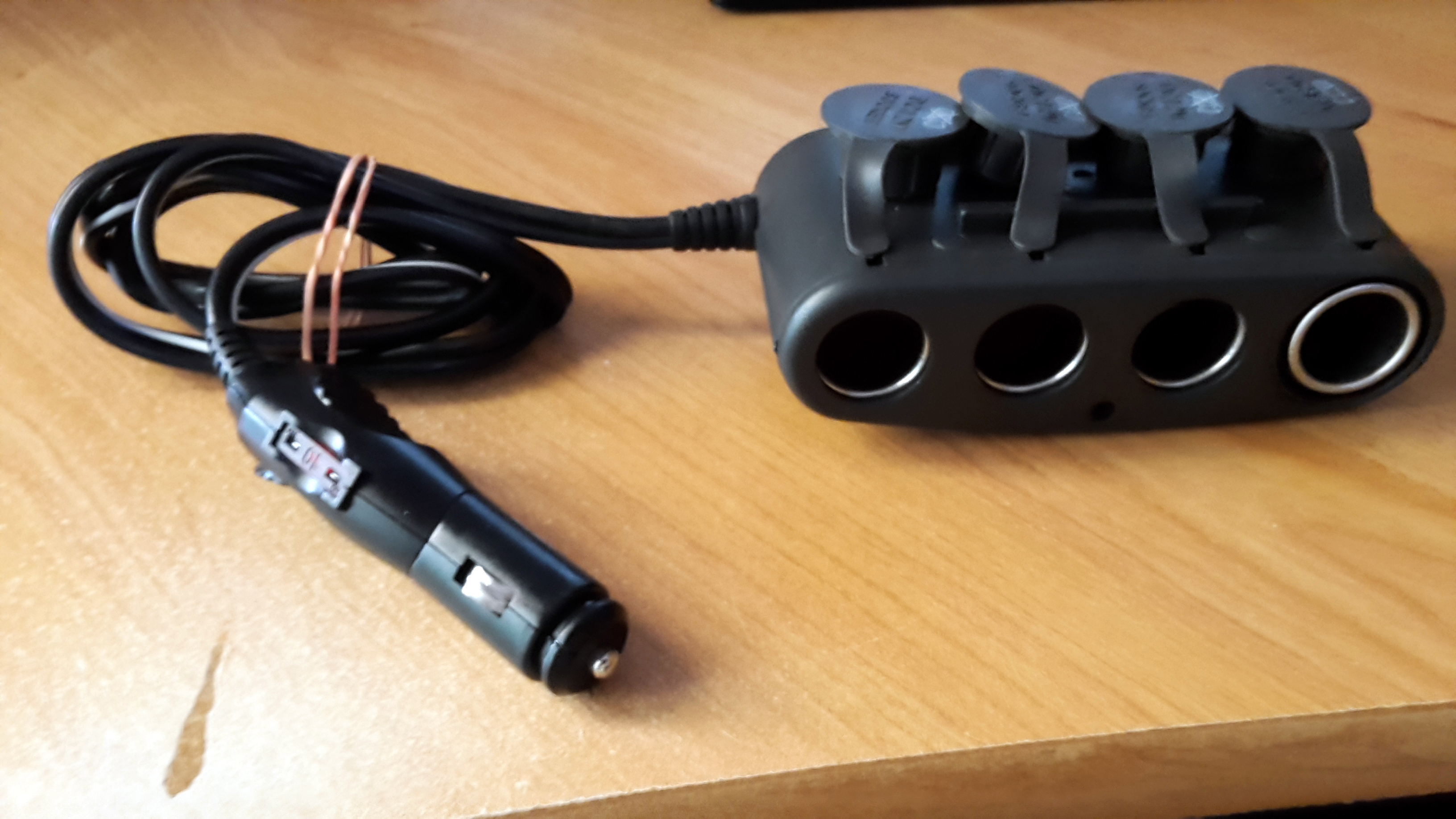 Prise multiple allume-cigare pour accessoires automobiles